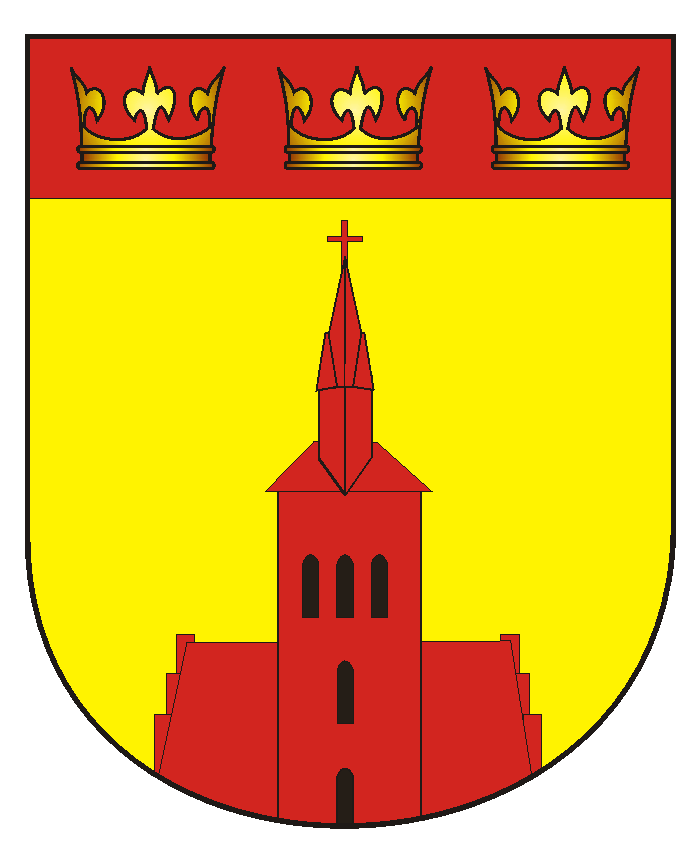 Herb gminy Kolno (woj. warmińsko-mazurskie)